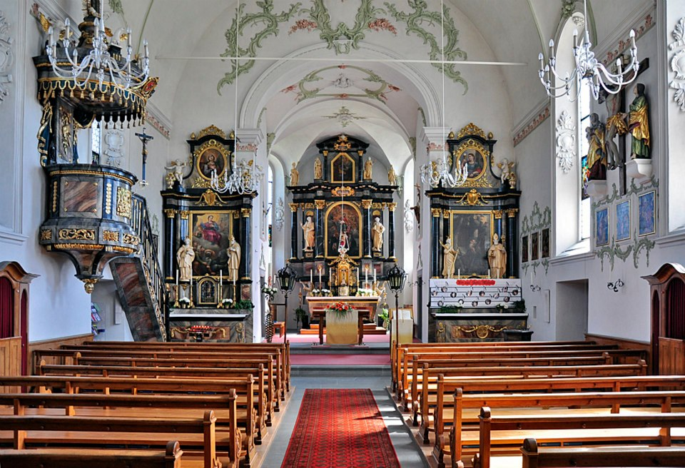 Inneres der Kirche St. Verena in Risch ZG